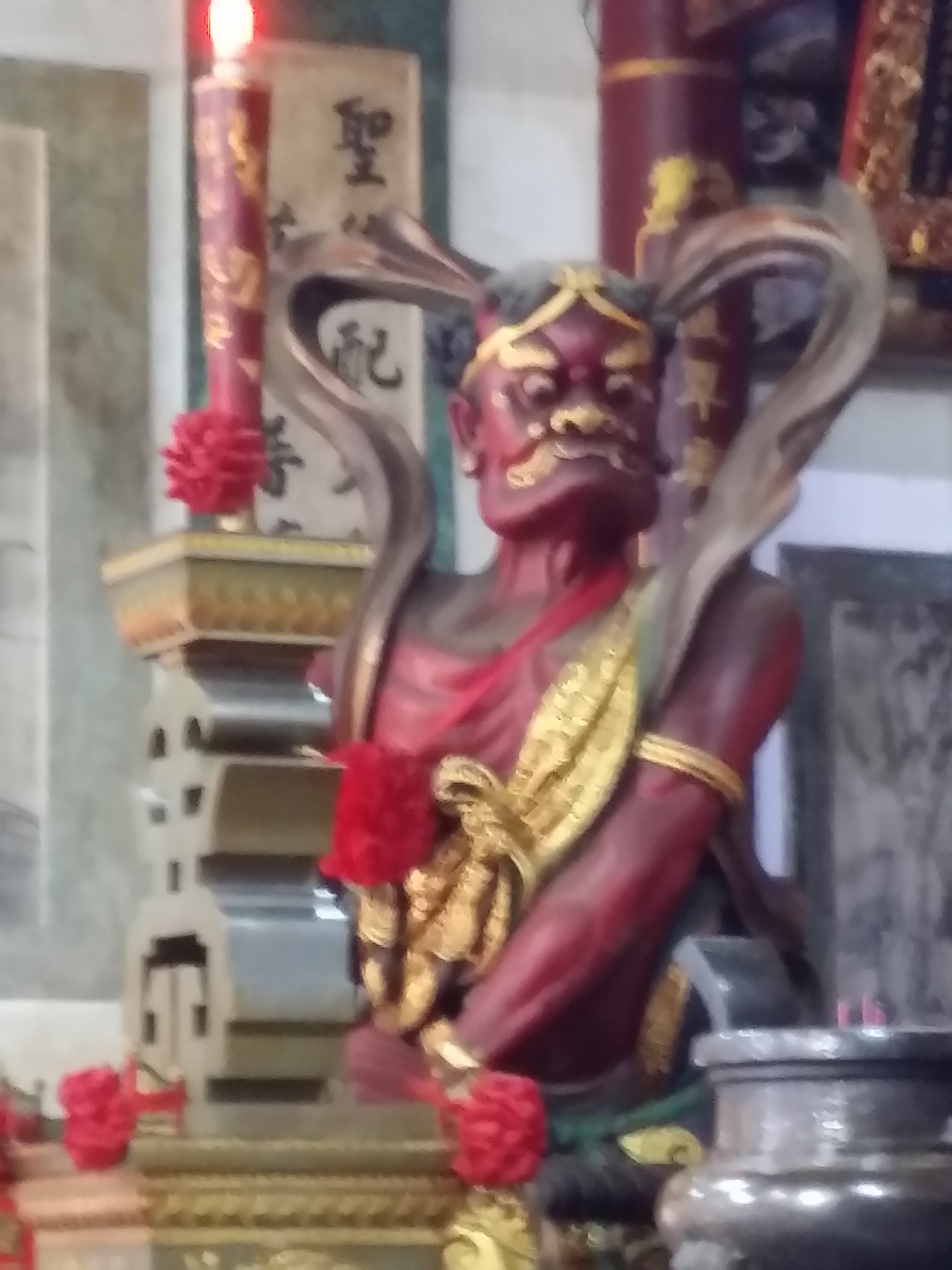 大天后宮千里眼（金精將軍）